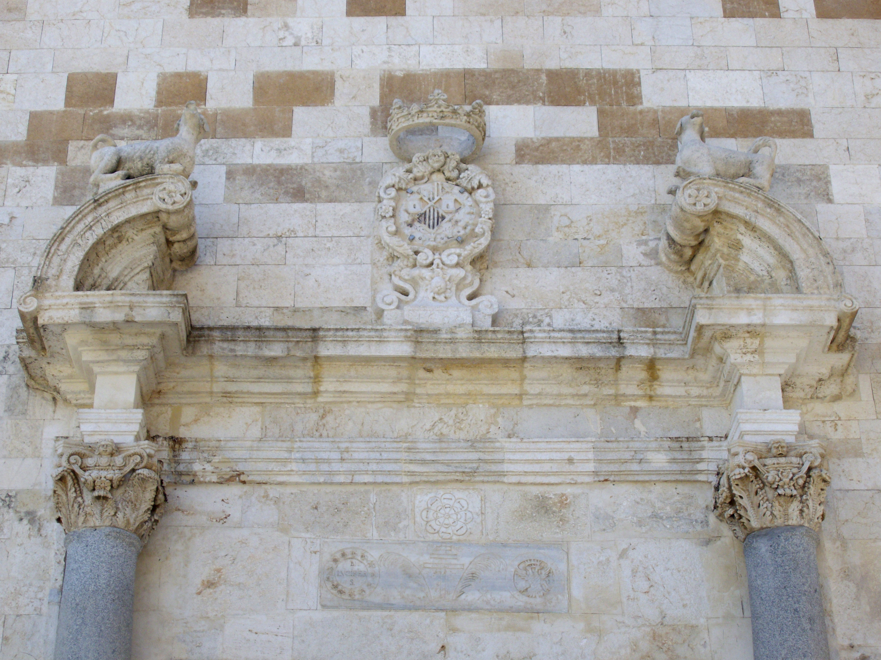 Chiesa di San Lucifero (XVII secolo) a Cagliari, particolare della facciata